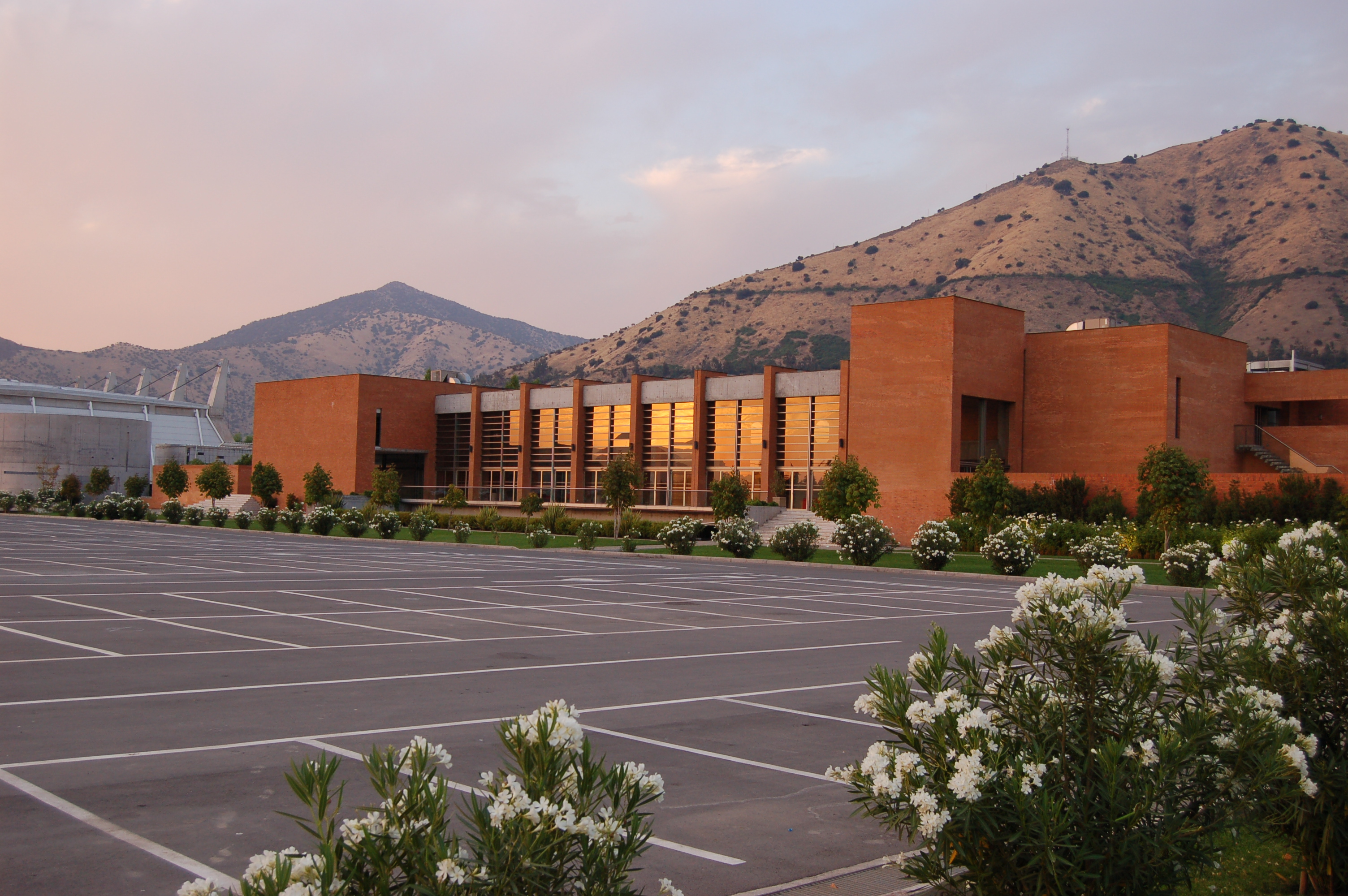 Centro de Eventos y Convenciones